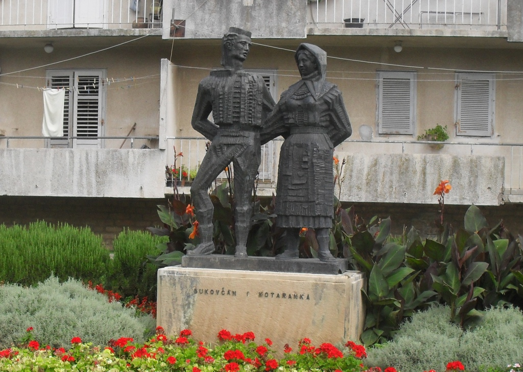 Споменик Буковчан и Котаранка у Бенковцу